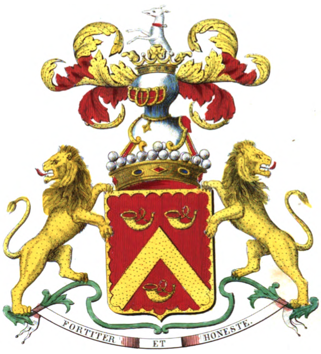 Armoiries de la famille Cornet